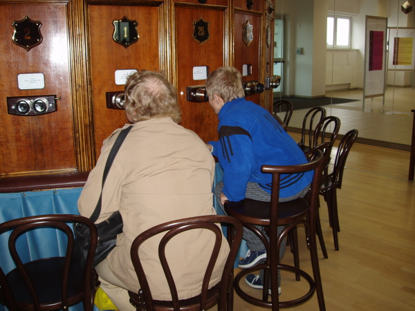 Technické muzeum v Brně, Expozice panoramy v TMB